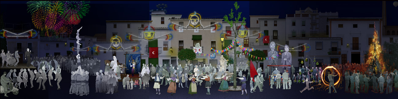 Imatge realitzada pel Museu Valencià d'Etnologia per al Museu Etnològic Comarcal de Benissoda. Representa una vila imaginada de la Vall d'Albaida on s'estan celebrant diferents festes i celebracions de la comarca.